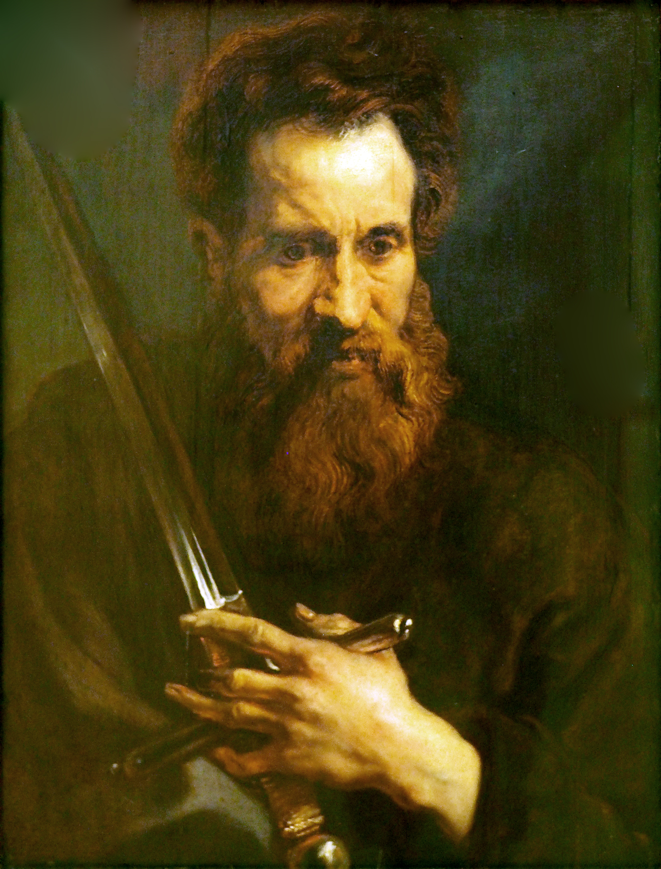 Das Schwert an der rechten Schulter soll ein Hinweis auf seinen Märtyrertod in Rom sein.